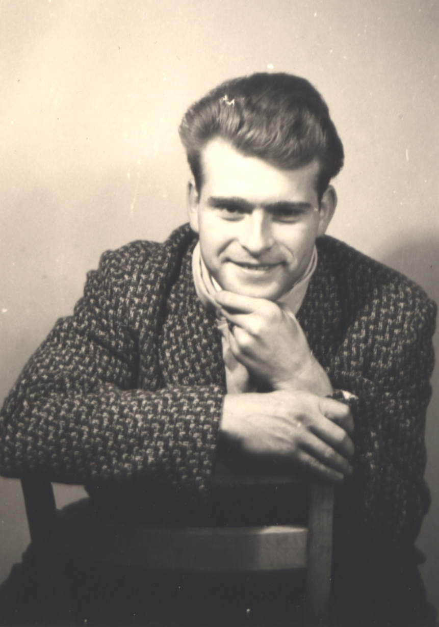 Auf dem Foto ist Hans-Georg Losert, ein bekannter Glasrestaurator aus Halberstadt, zu erkennen. Die Fotografie stammt von ca. 1960.